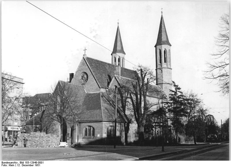 Illus Klein 12.12.1951 Kirchenaufbau im demokratischen Sektor Berlins. Die Kirche in Pankow, Breitestrasse, die durch Kriegseinwirkungen zerstört wurde, ist wieder aufgebaut.